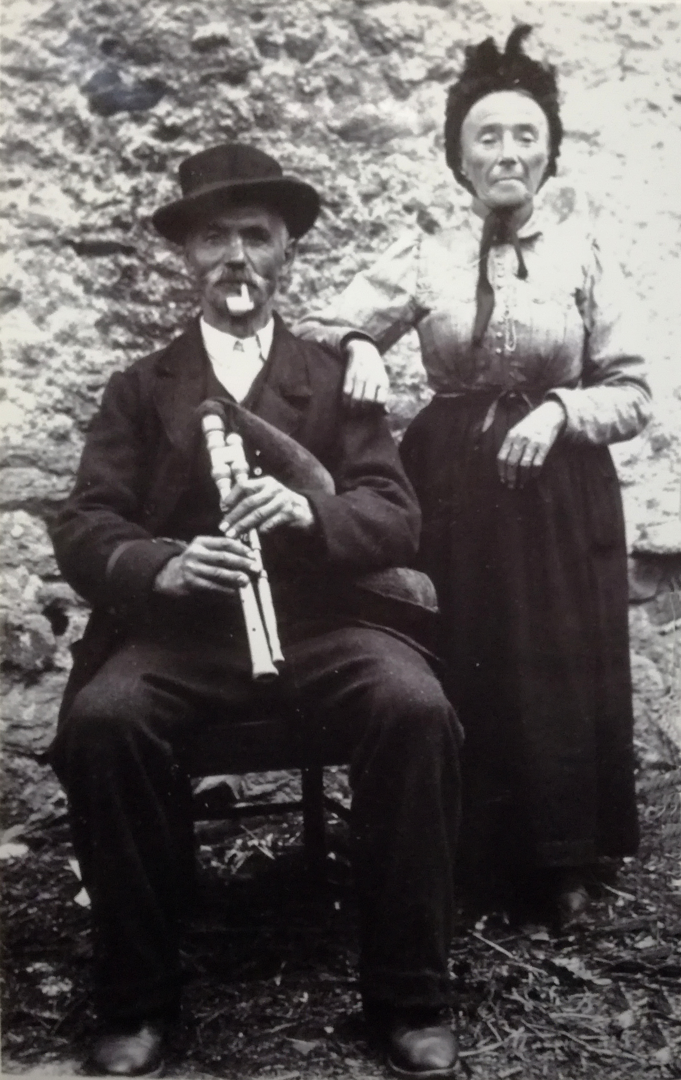 Cabretaïre et son épouse, Auriac-l’Église vers 1905 - Auvergne - France